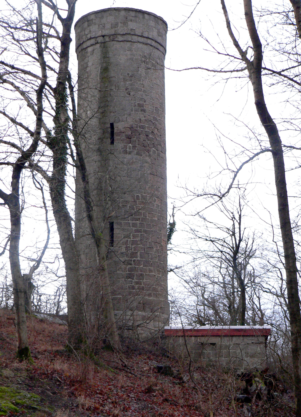 Ithturm